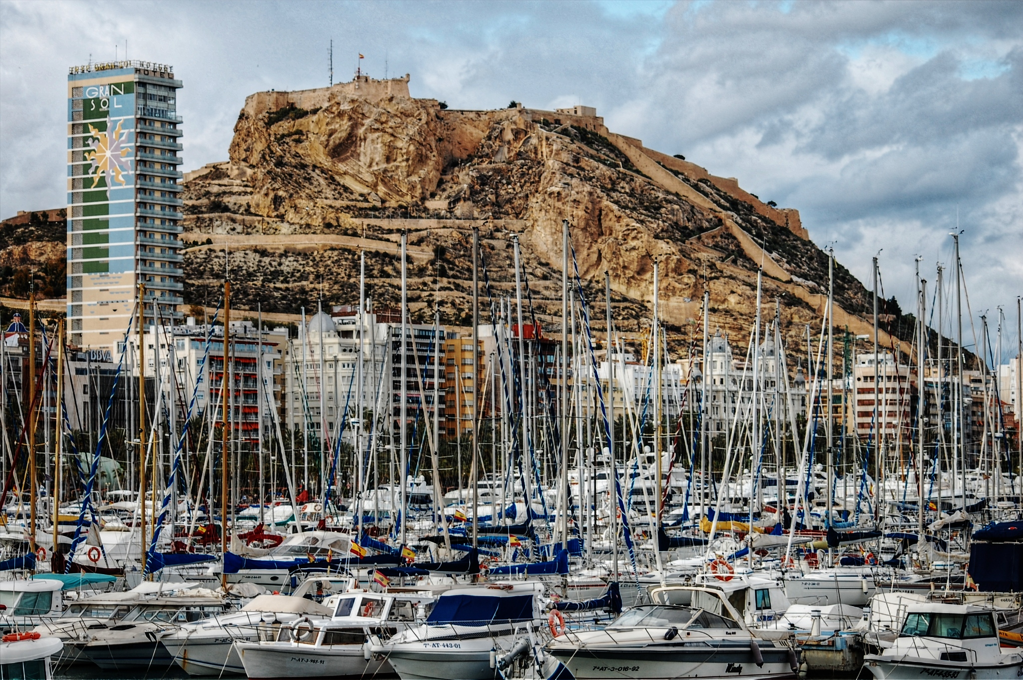 Vista del puerto de Alicante (España).